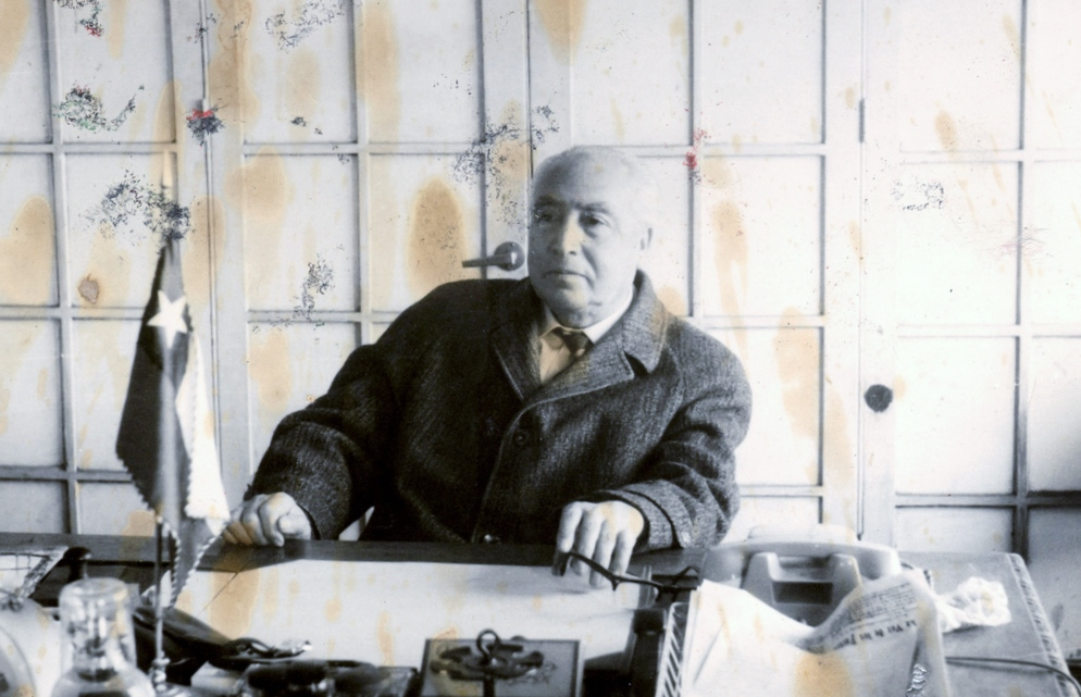 El político chileno Ernesto Araneda Rocha